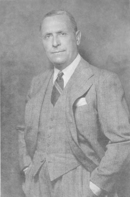 Embajador Felipe A. Espil